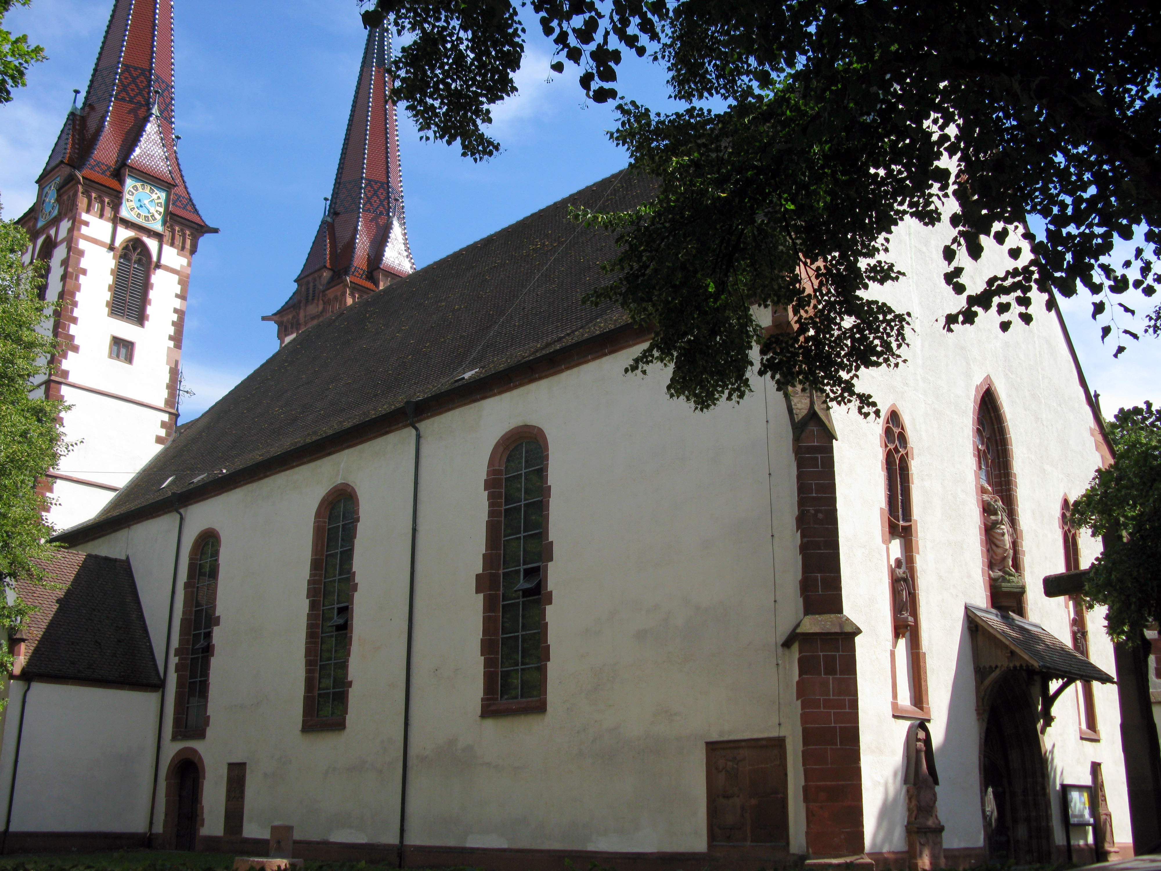 St. Laurentius in Kenzingen, Nordfassade